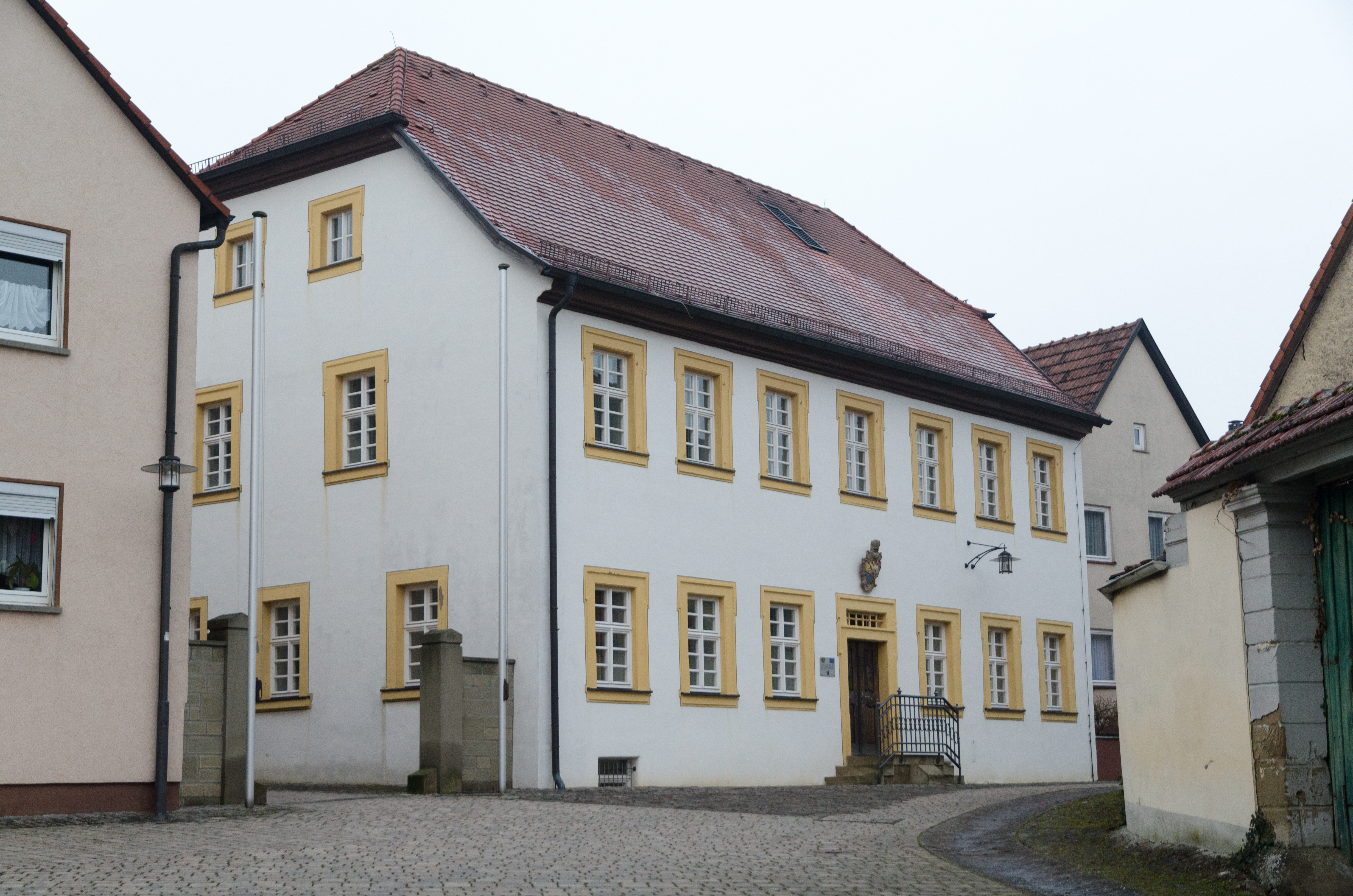 Oerlenbach, Ebenhausen, Schloßstraße 14